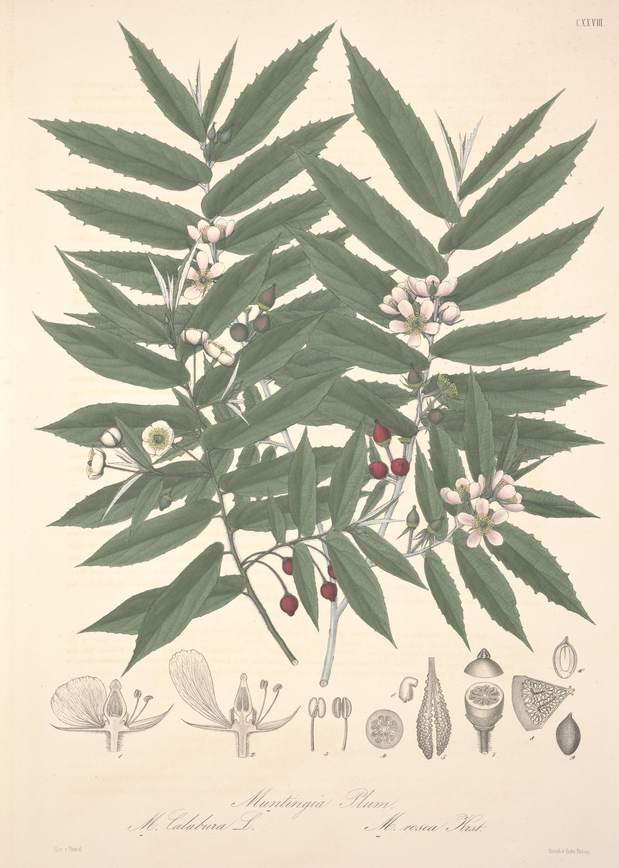 exivE, Ciez vI!io.Yei .).nii;kf QebrlleHiis